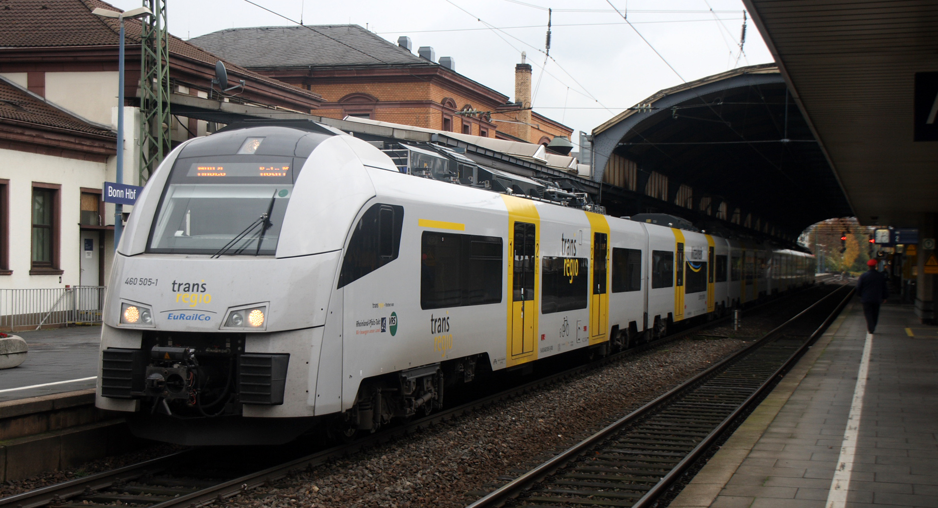 DPSM_1103